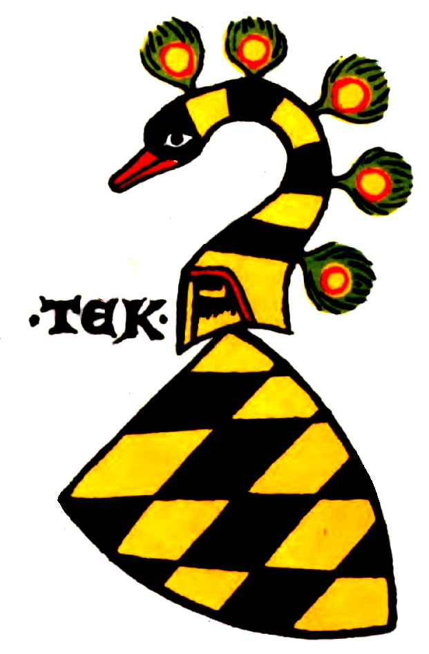 Wappen der Tek